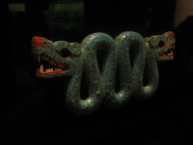 British Museum, London : serpent à deux têtes, civilisation aztèque-mixtec, vers 1400-1521